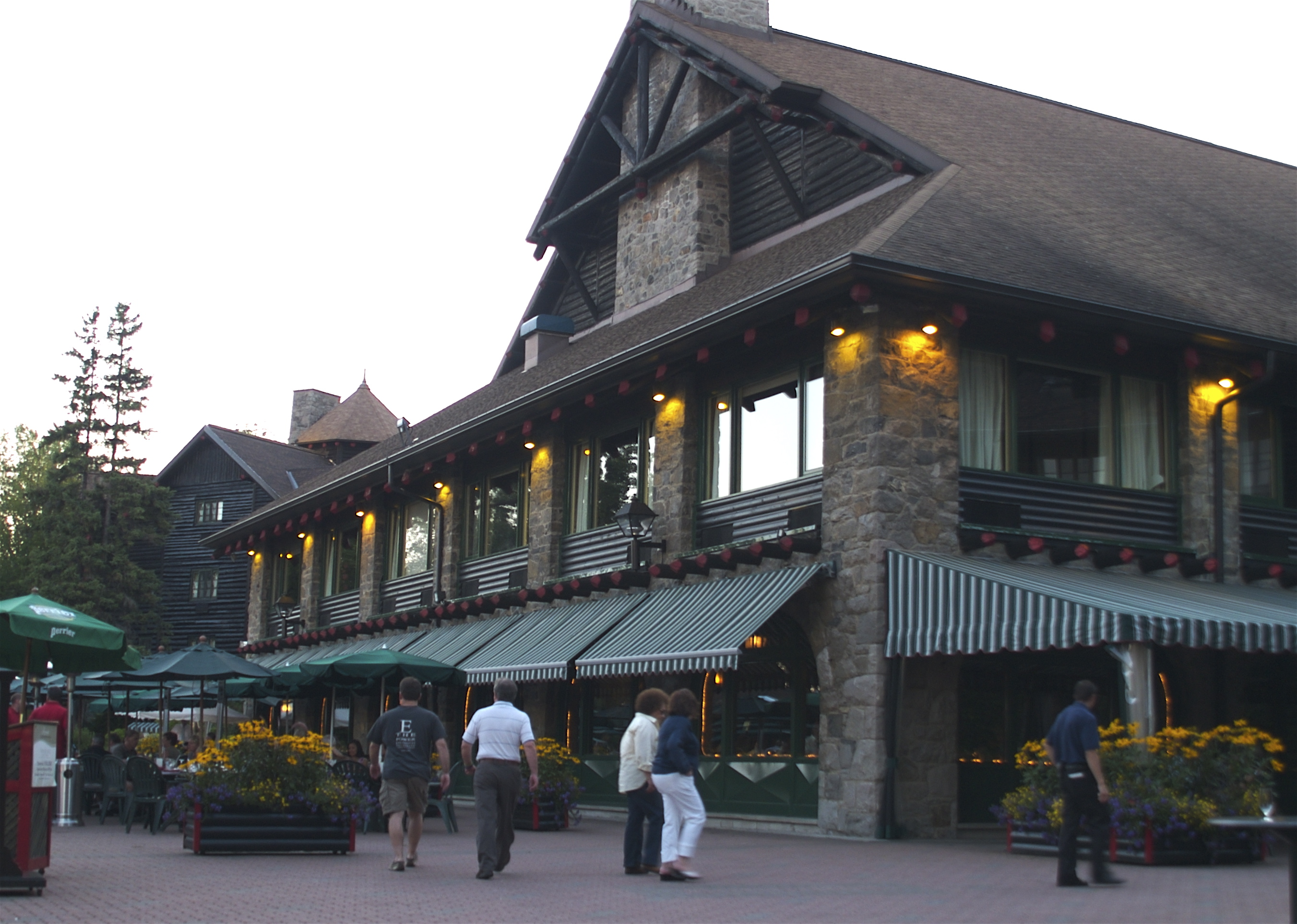 Chateau Montebello hotel in Montebello, Quebec, Canada